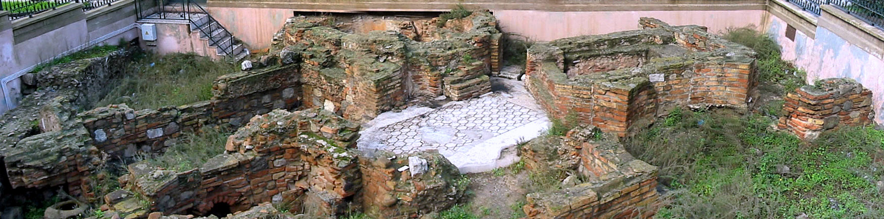 Resti di Terme Romane sul lungomare di Reggio Calabria